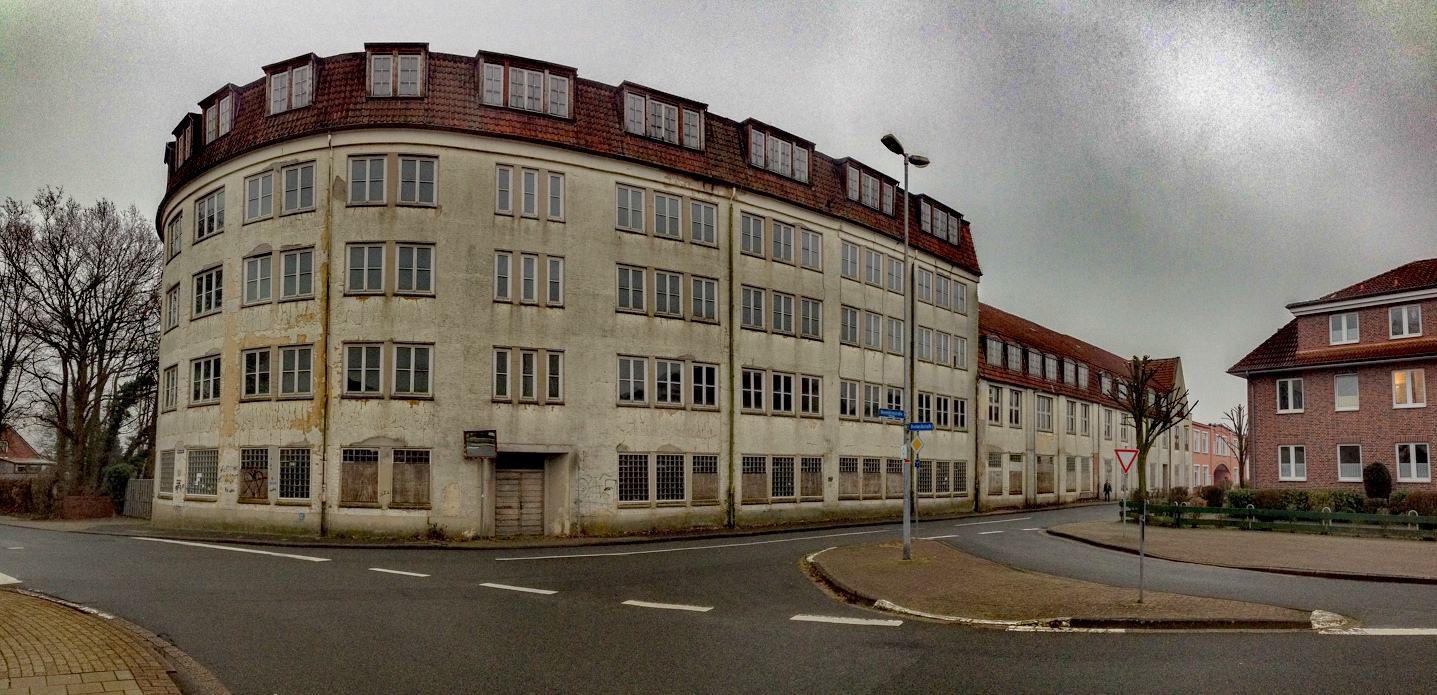 Blick auf das ehemalige Hansa-Werk in Varel (Oldb) an der Ecke Neumühlenstraße/Hansastraße